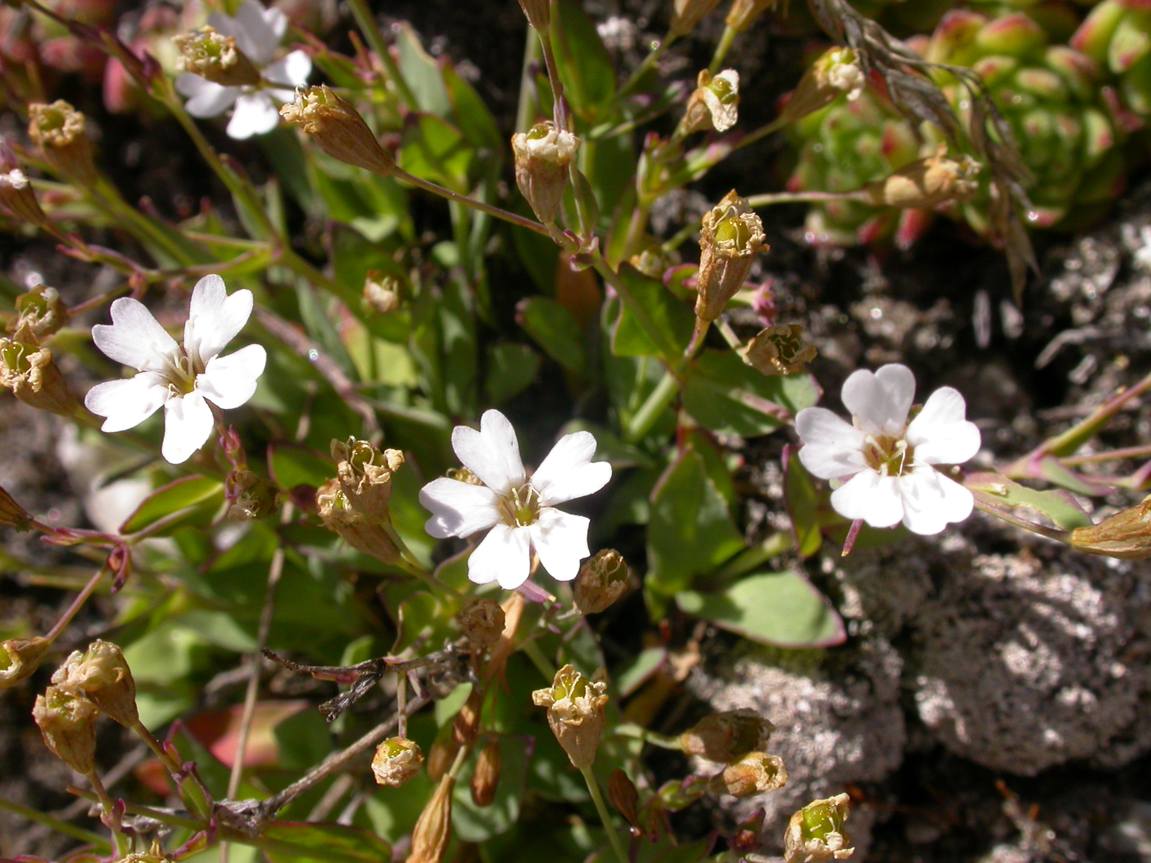 Silene rupestris Zermatt, Riffelberg (Kanton Wallis, Switzerland), 2500 m Author: Barbara Studer – own photograph Date: 2.08.06